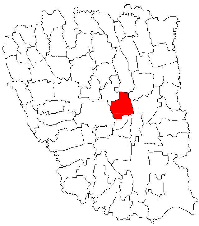 Categorie:Hărţi ale judeţului Galaţi